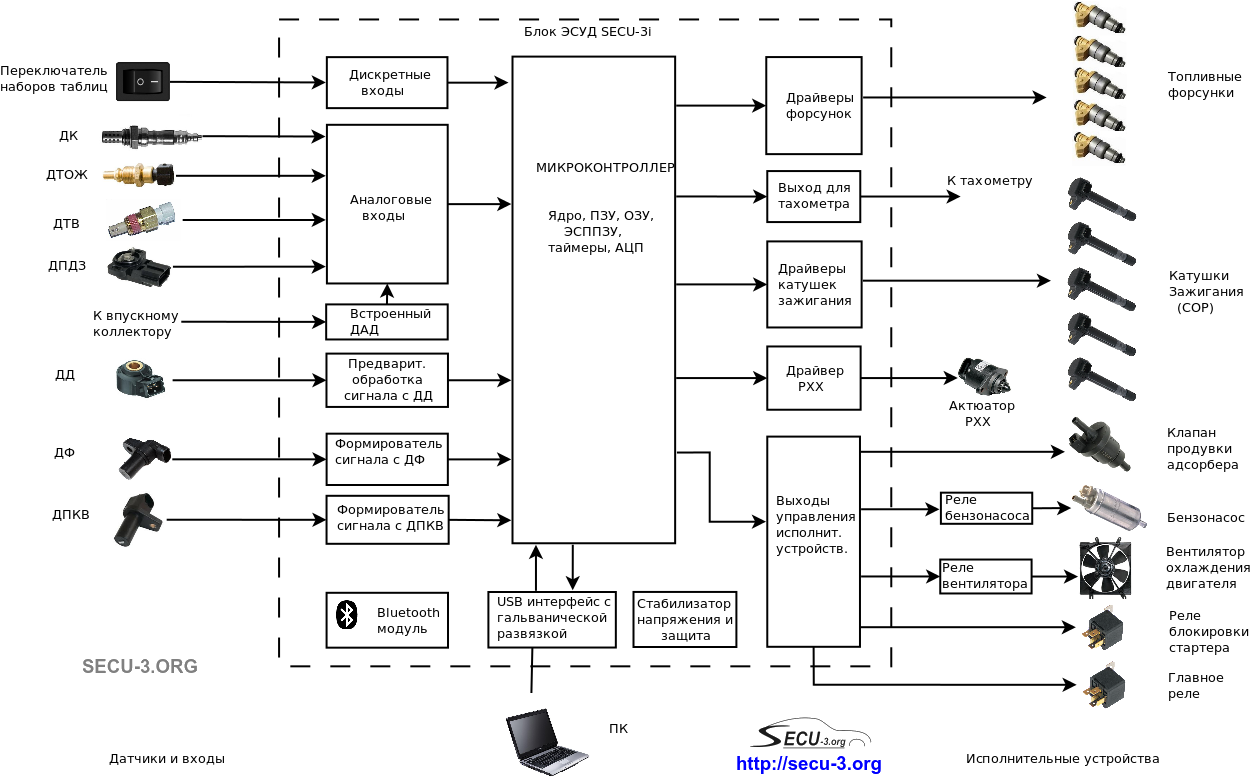 Структурная схема системы с блоком ЭСУД SECU-3i (пример, не описывает все возможности)